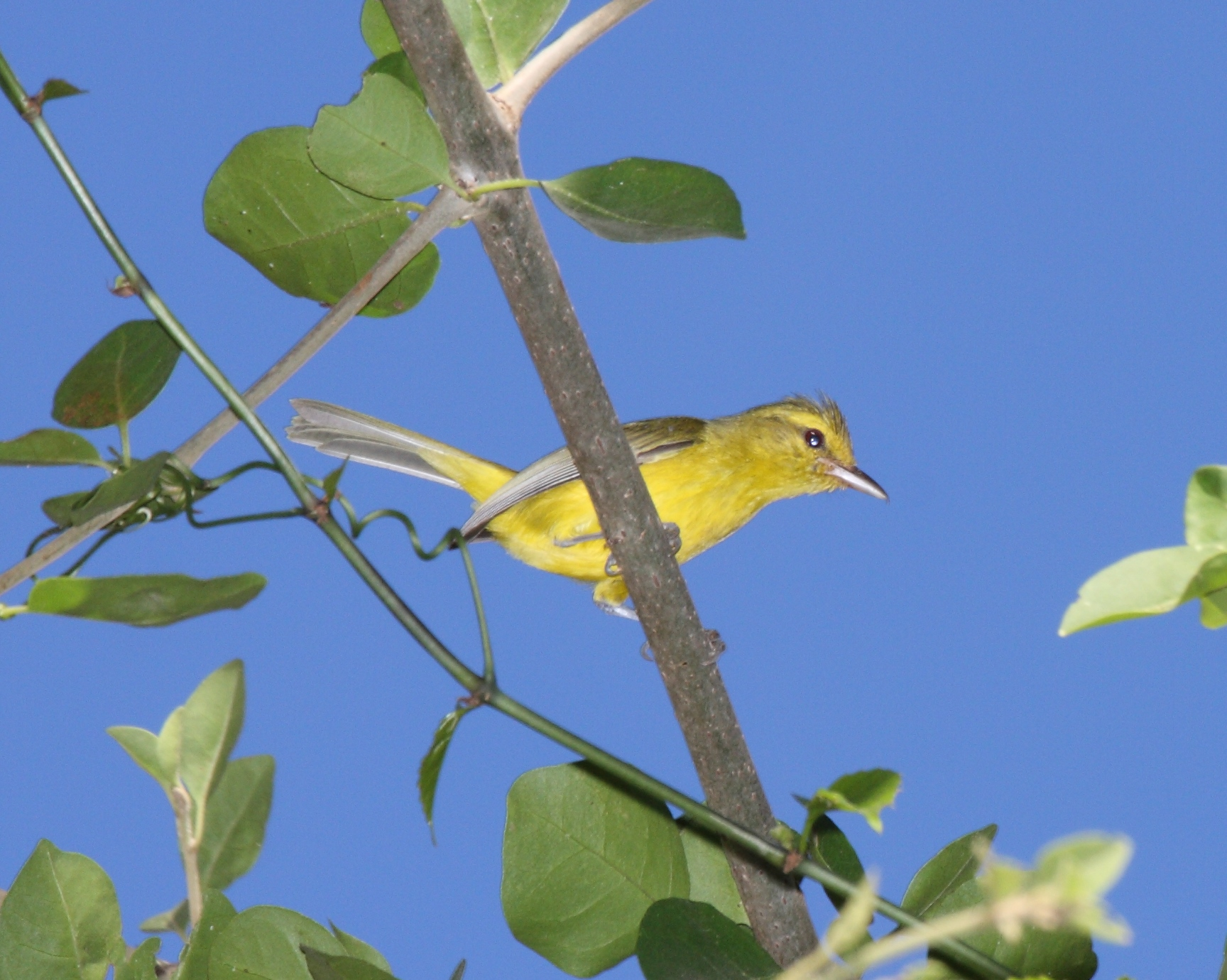 Vireo dorado en Jalisco, México